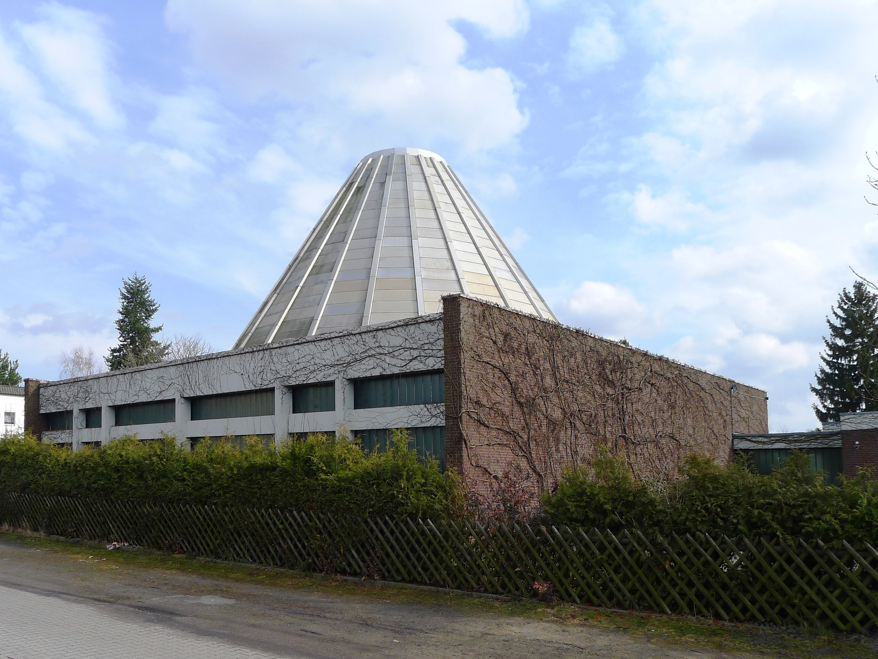 Kirche Zu den heiligen Märtyrern von Afrika (Berlin-Lichtenrade)